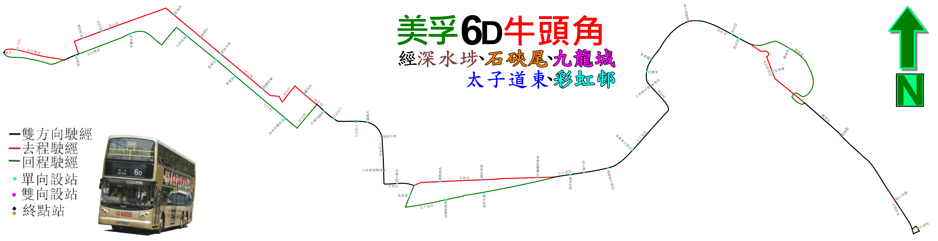 中文（香港）: 九巴6D線的走線圖